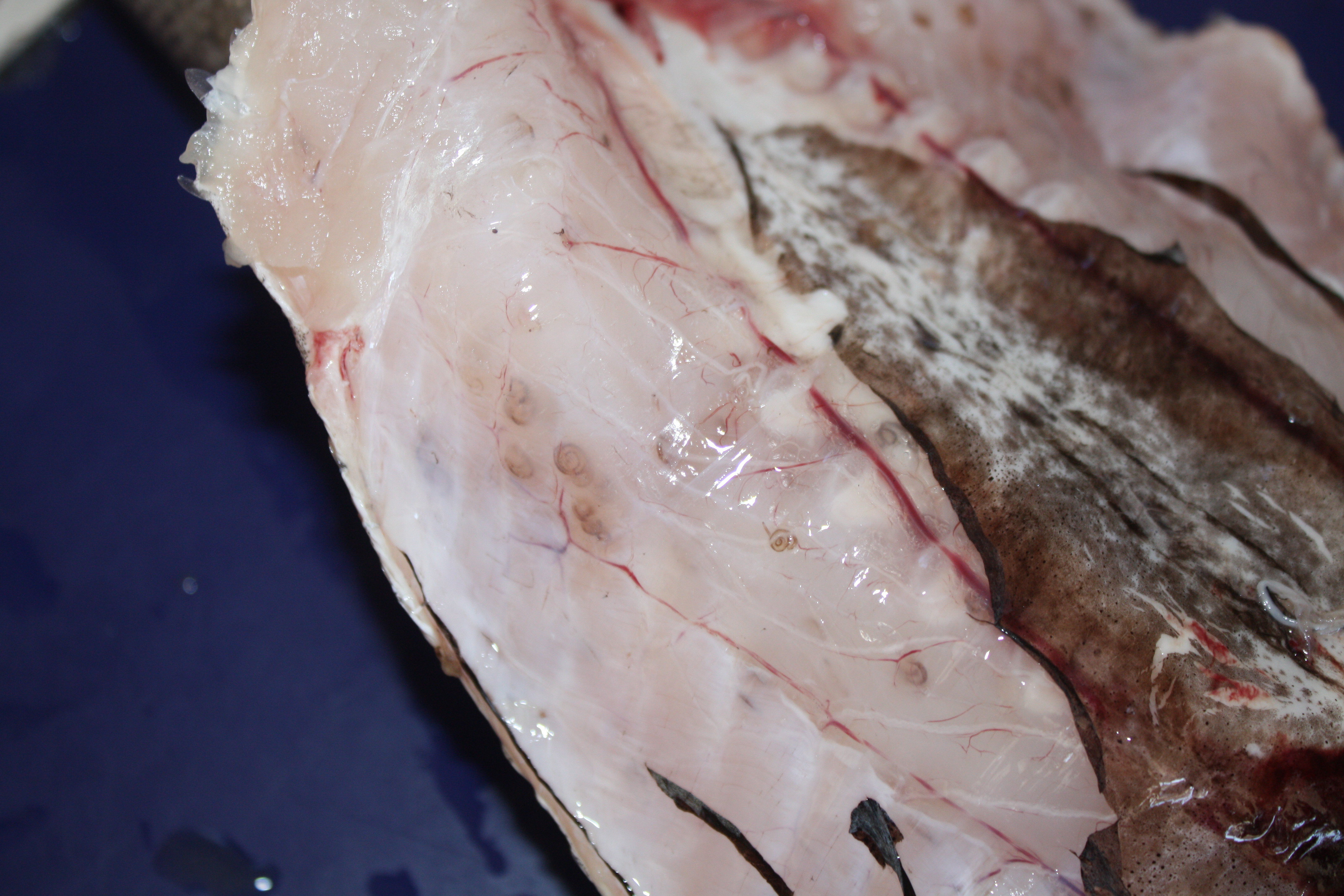 Interior da cavidade abdominal dunha pescada, unha vez eliminado o peritoneo, mostrando unha intensa parasitación por anisaquis.